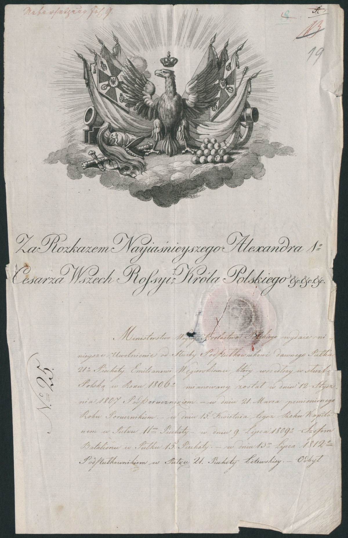 strona 1